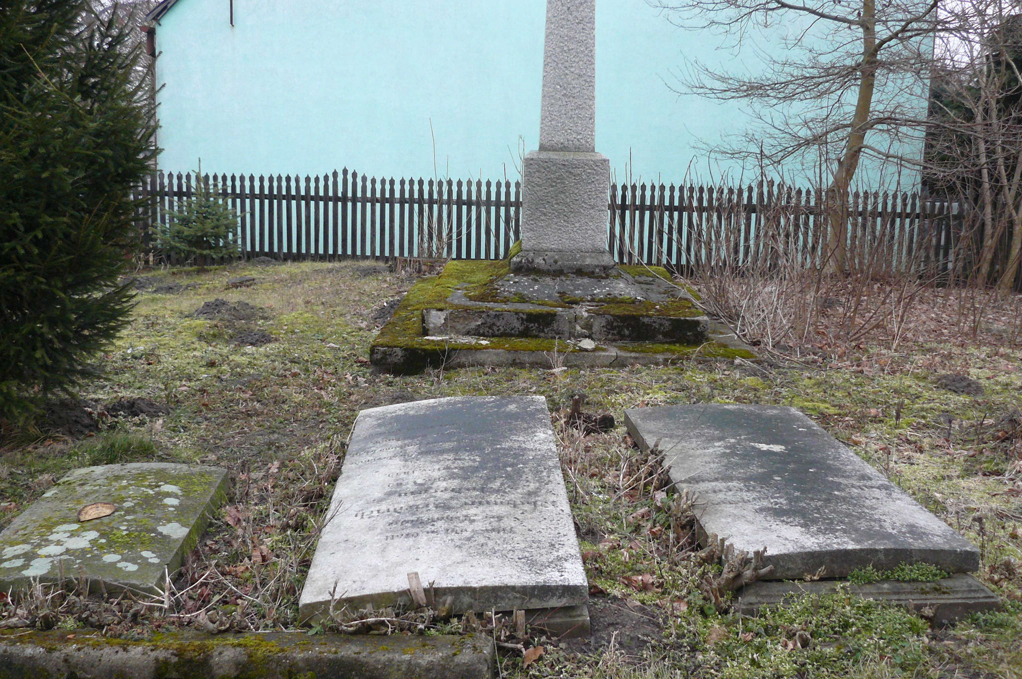 Chełst - rzymskokatolicki kościół filialny pw. Matki Boskiej Królowej Polski